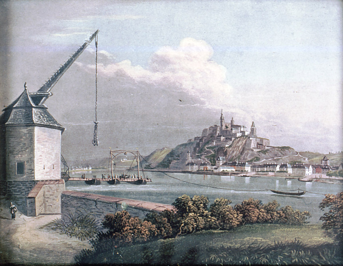 Kolorierter Aquatintastich Ehrenbreitstein und Fliegende Brücke, der Kran ist heute das Pegelhaus